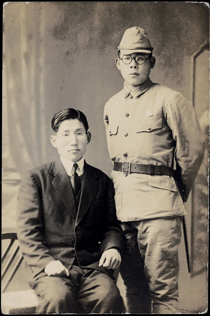 1944년 학도병 시절의 김수환